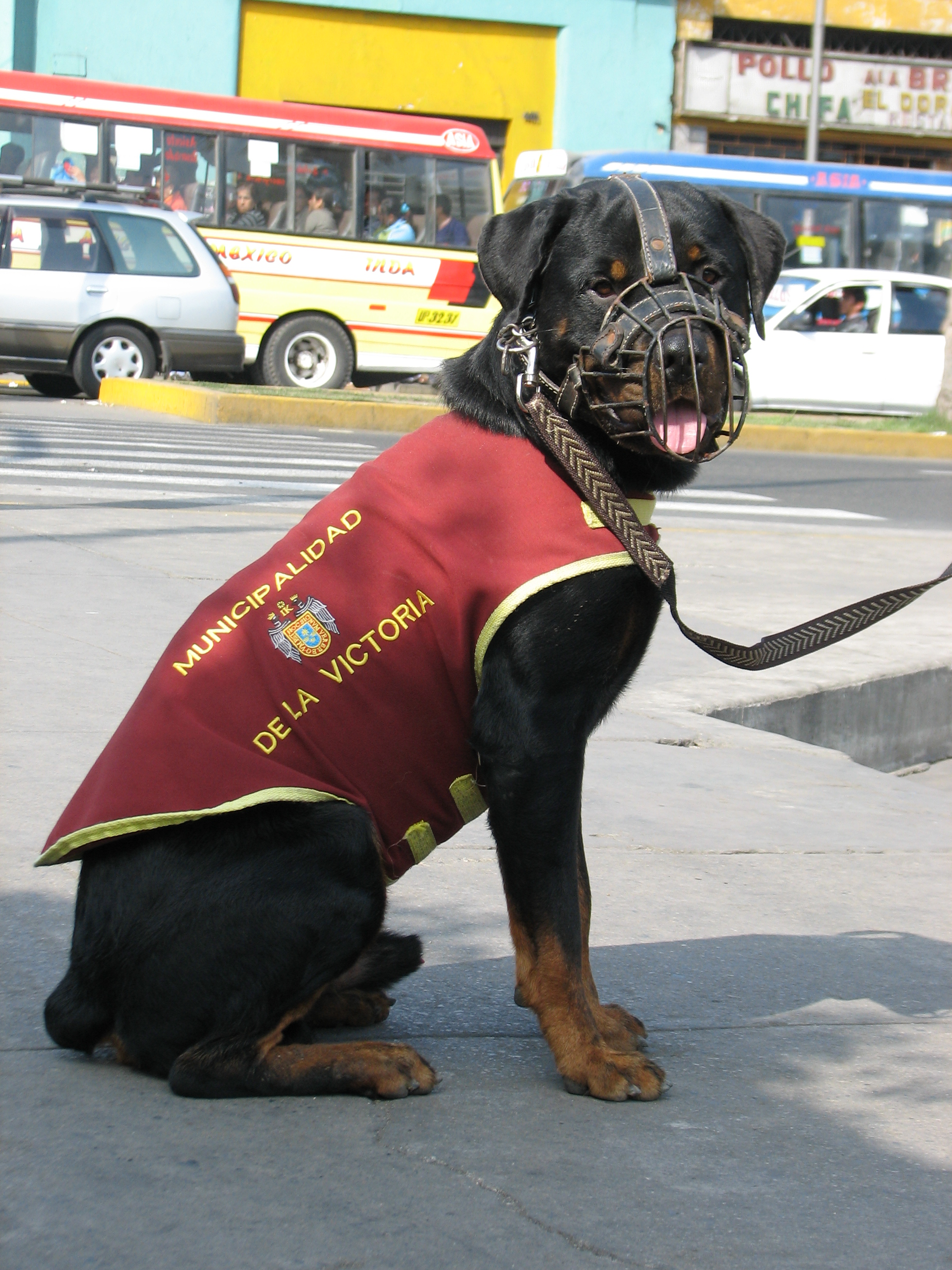 Police dog in Lima, La Victoria, Plaza Manco Cápac, La Victora/Lima, Peru